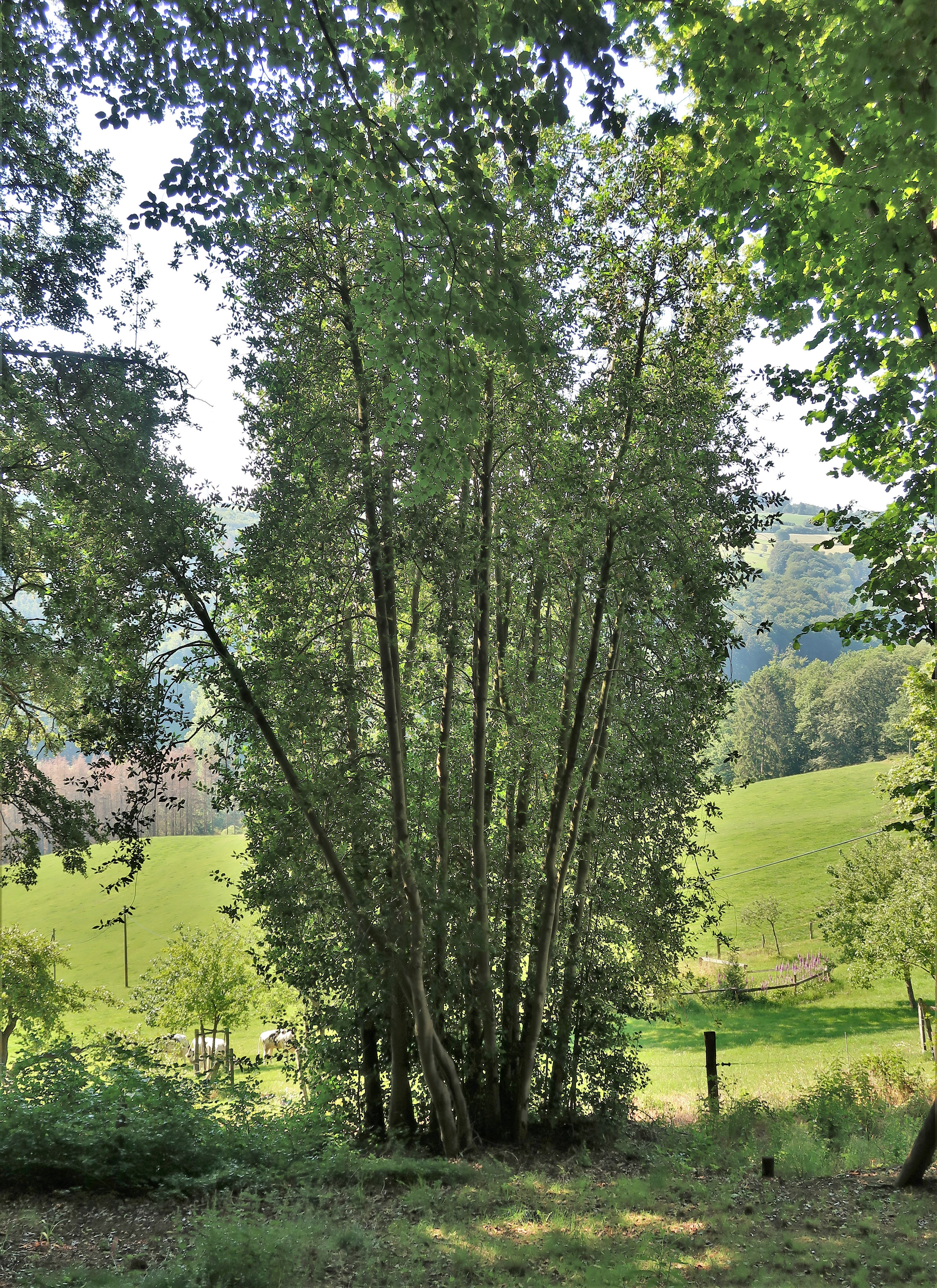 Geschützter Landschaftsbestandteil 1.4.2.81 „Hülsen Deipenbrink“ in Hagen, östlich des Hauses Deipenbrink 2. Es handelt sich um drei Gehölzgruppen aus 75 Hülsen (Stechpalmen) mit einem Stammumfang von 15 cm – 25 cm, ca. 10 m Höhe und ca. 10 m Kronendurchmesser sowie um eine Weide.